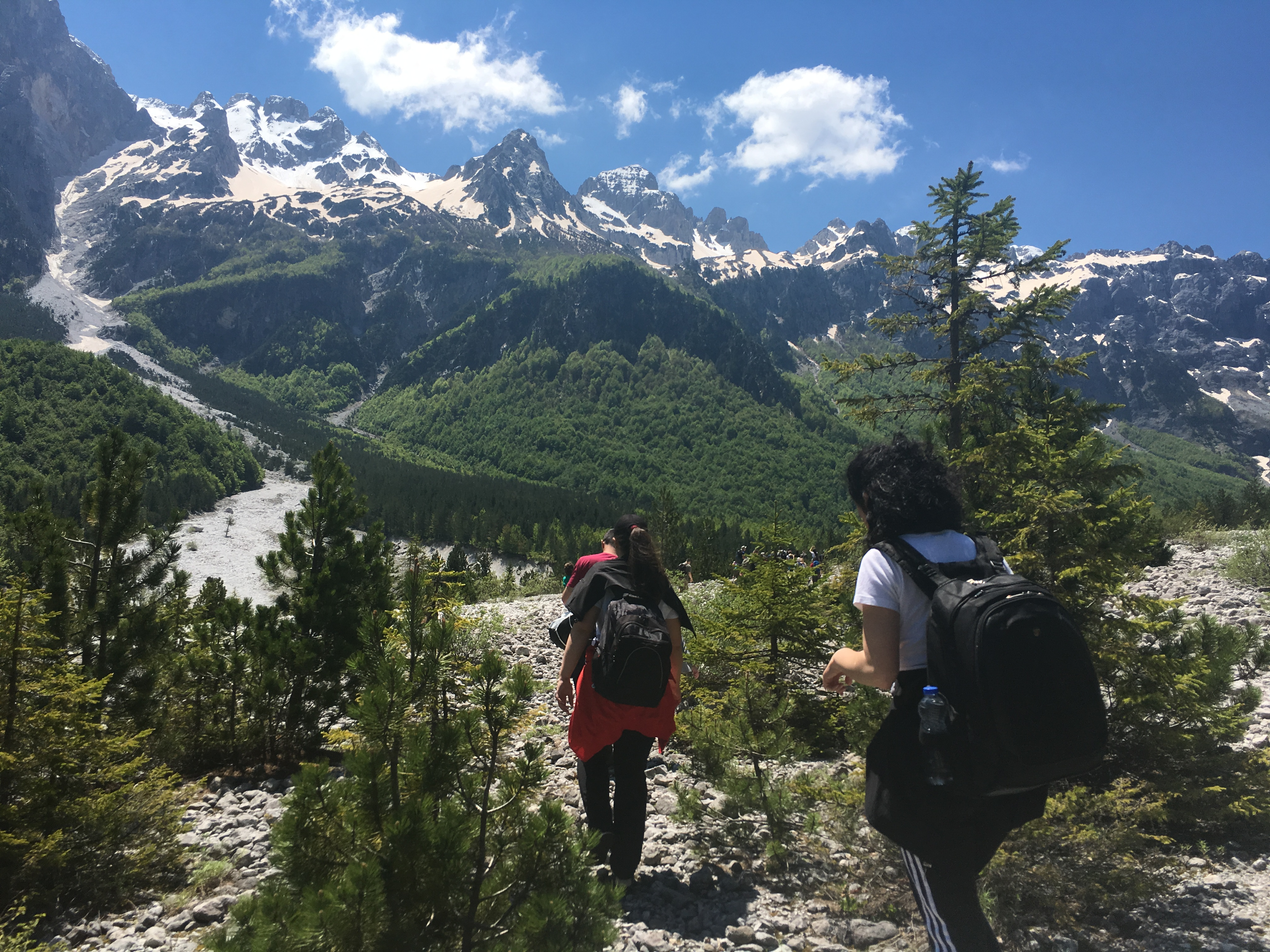 Lugina e Valbones, Tropoje